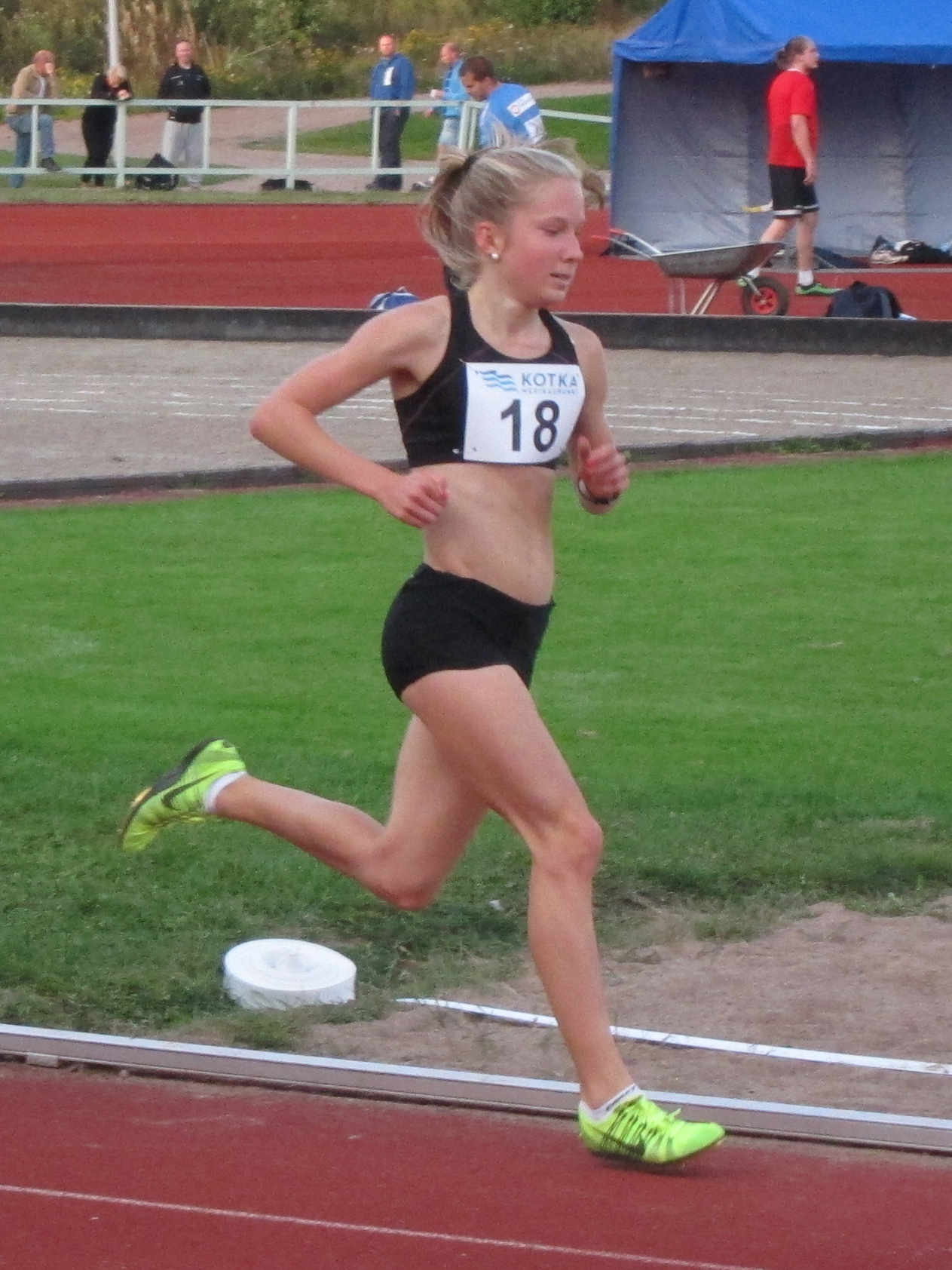 Suomalainen keskimatkojen juoksija Minttu Hukka.